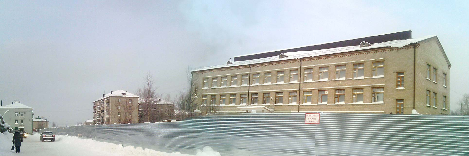 НИИ Галургии, г. Березники